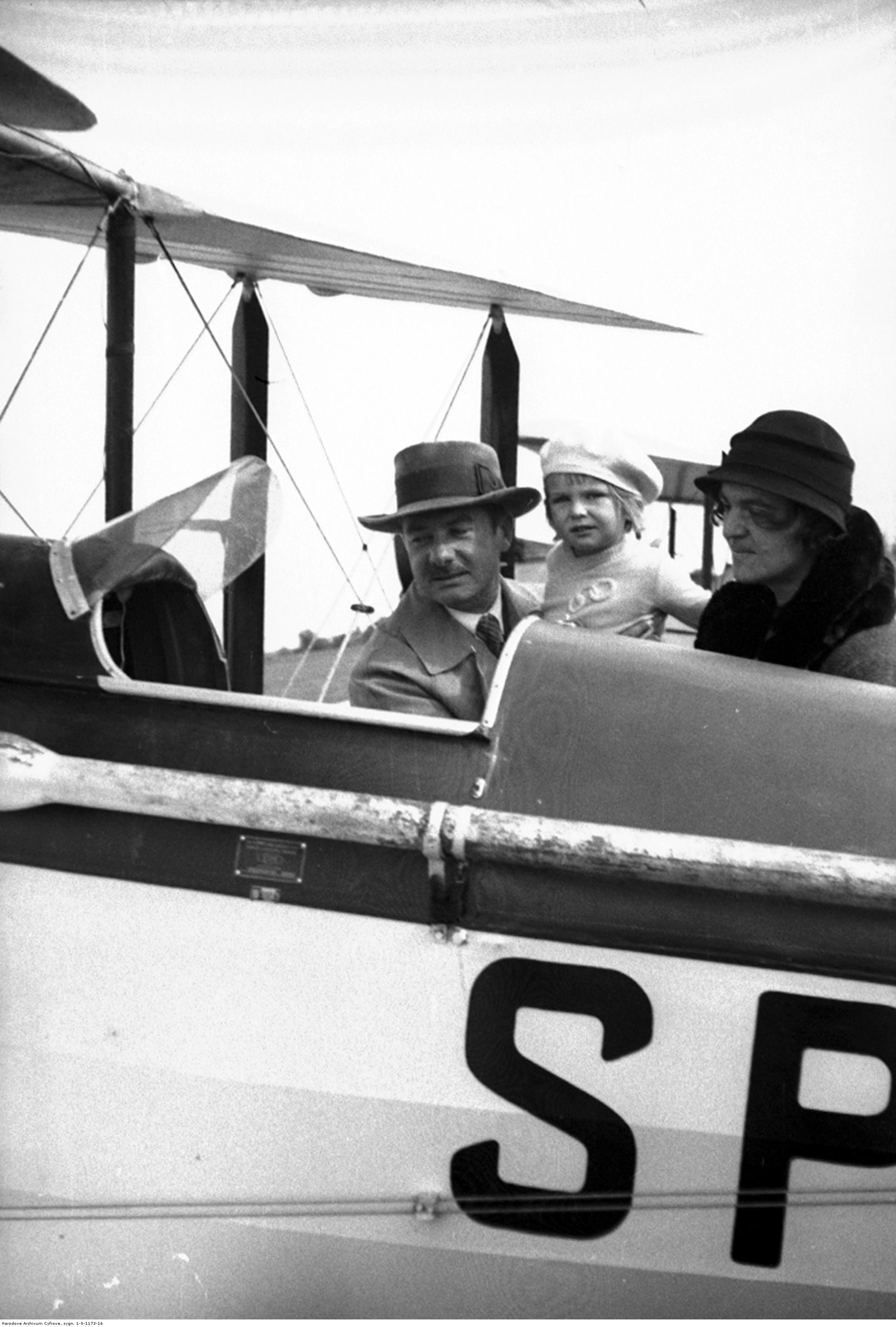 Starosta ropczycki Roman Siła-Nowicki podczas otwarcia lotniska turystycznego w Dębicy